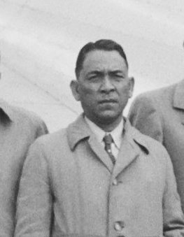 Collectie / Archief: Fotocollectie Anefo Reportage / Serie: [onbekend] Beschrijving: Aankomst West Indische delegatie Trefwoorden: AANKOMST, delegatie Auteursrechthebbende: Nationaal Archief Materiaalsoort: Negatief (zwart/wit) Nummer archiefinventaris: bekijk toegang 2.24.01.03 Bestanddeelnummer: 901-8096 V.l.n.r. van rechts naar links: F.J.G. Kwartsz, C.A. Eman, E.J. Jonkheer, dr. M.F. da Costa Gomez, W.L. Plantz (allen afkomstig van Curaçao) H. Miskin, S. Rambaran, A.M. van Eyck, J.C. Ho A Sjoe, F.H.R. Lim A Po, A.R.L. Smit (allen afkomstig uit Suriname) Plaats: Schiphol